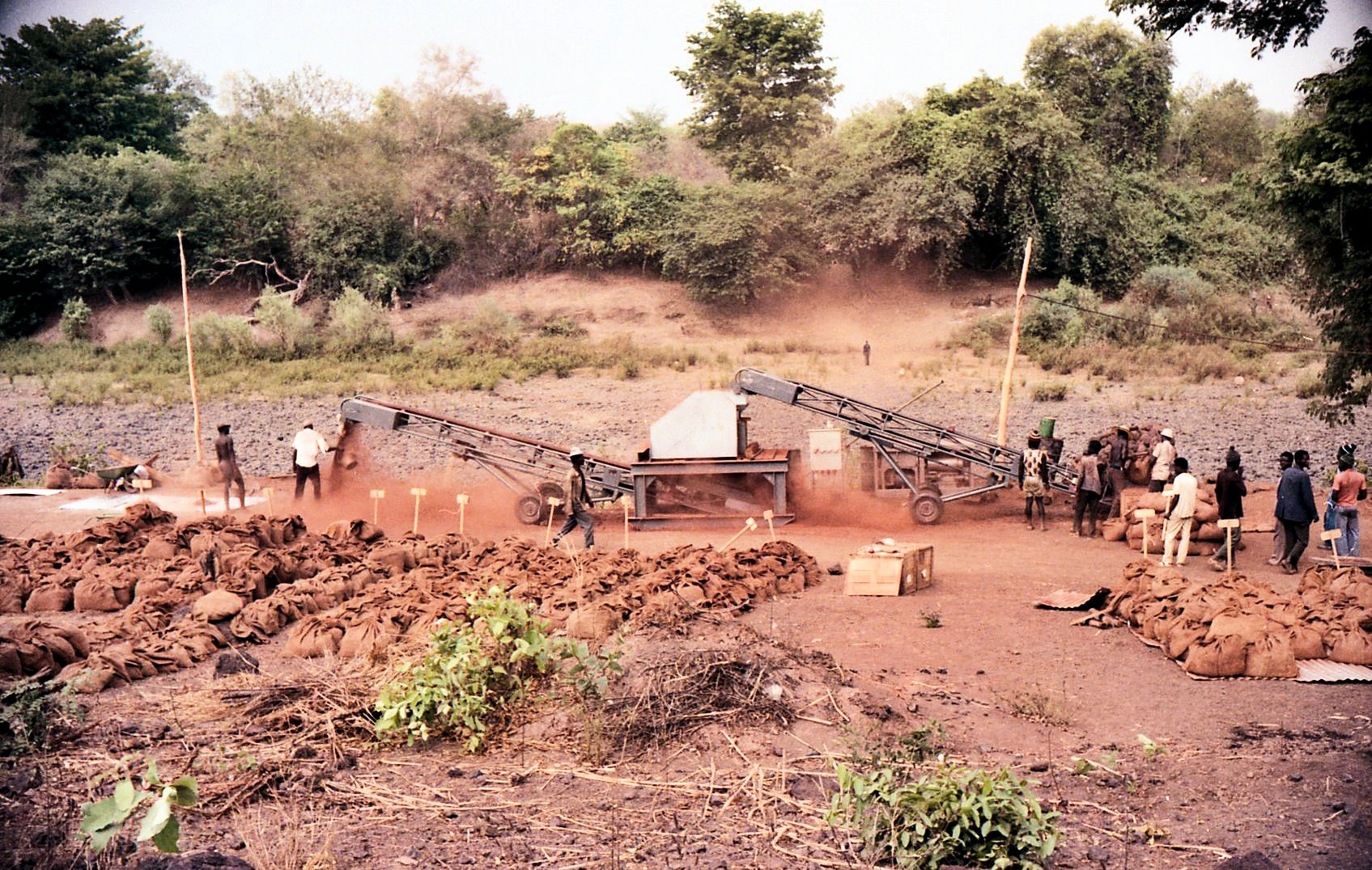 Industrial scale sampling